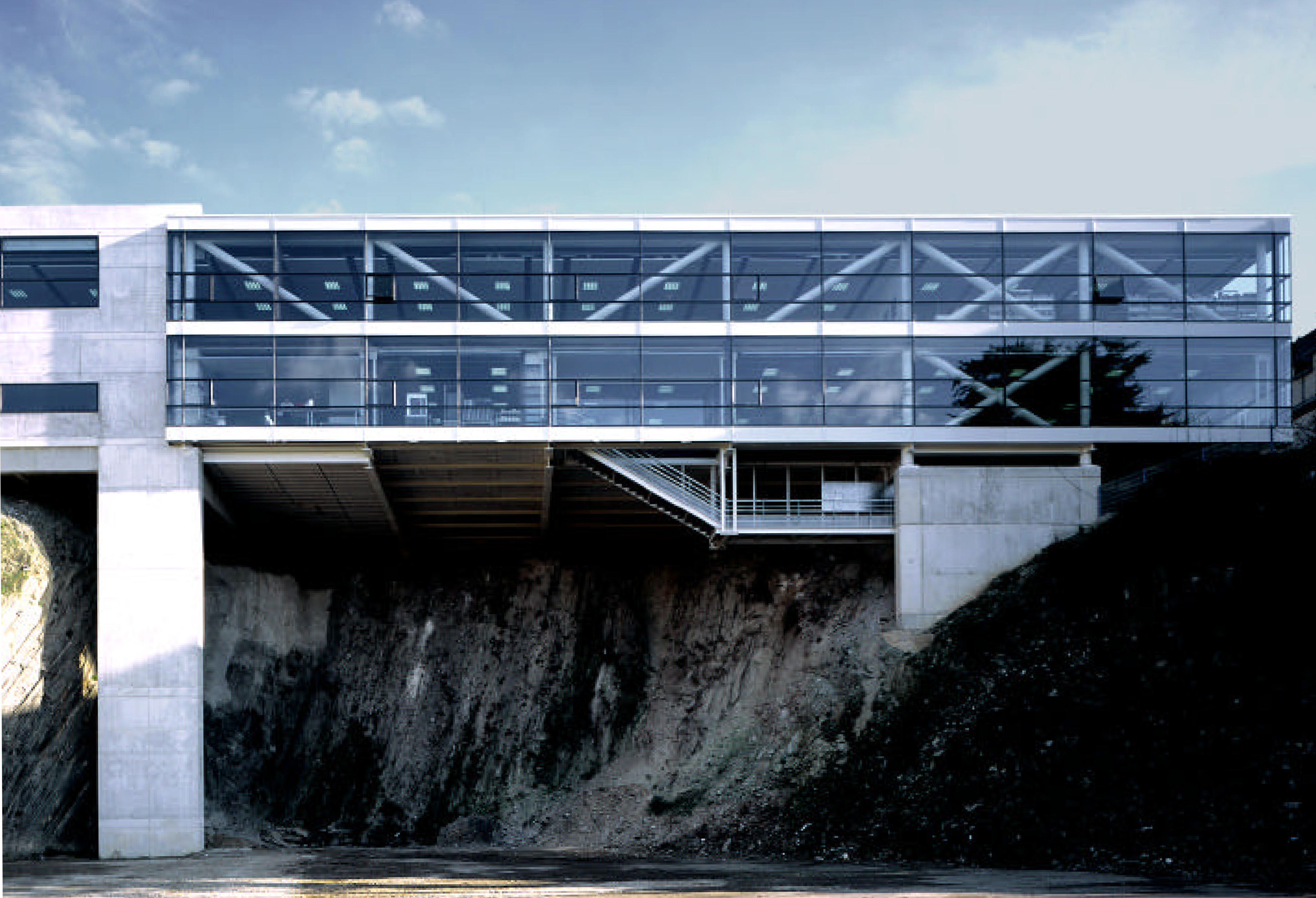 Photographie du lycée Saint-Louis de Chateaulin (Finistère), France, projet AMA/Thierry Melot de 1998